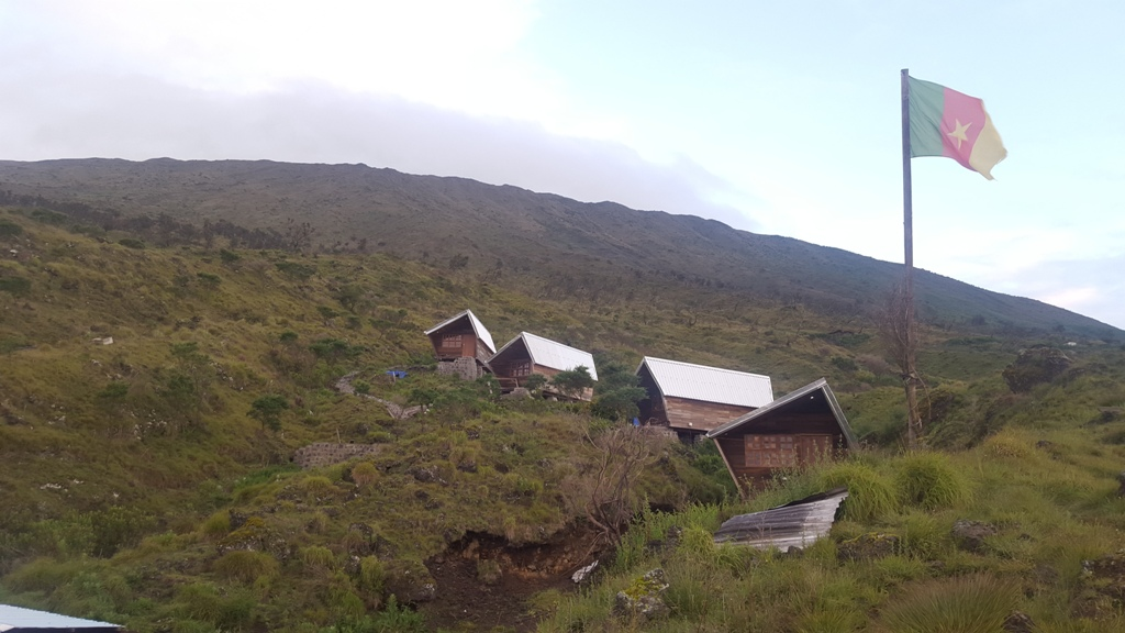 Beautiful view of the newly constructed Eco-lodges at Hut 2, Mount Cameroon National Park, South west region of Cameroon. The lodges have comfortable beds and solar electricity.